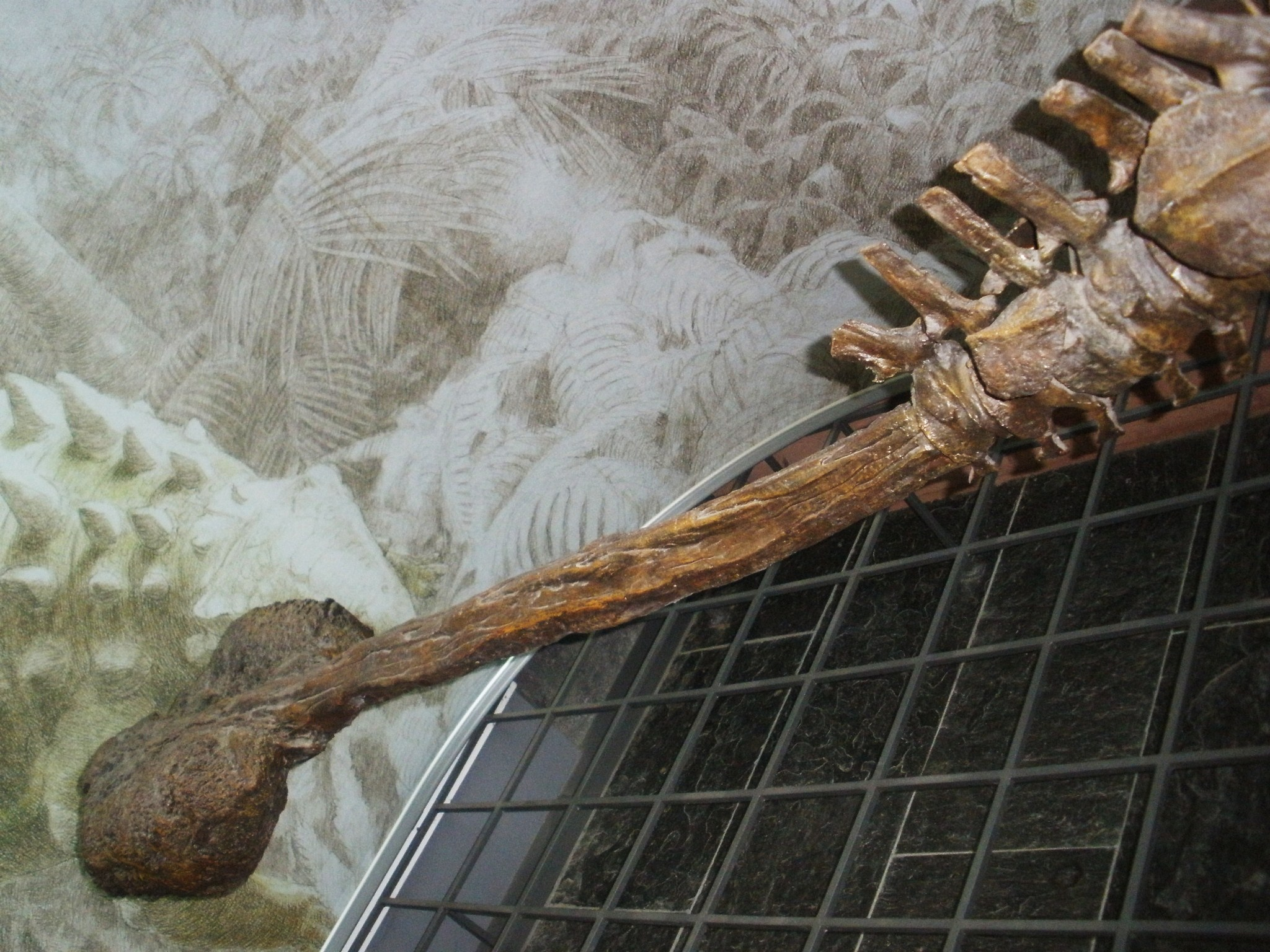 Fossil of mounted Euoplocephalus cast (though no complete tail clubs are known from this animal), an extinct ankylosaurian- Took the photo at Senckenberg Museum of Frankfurt